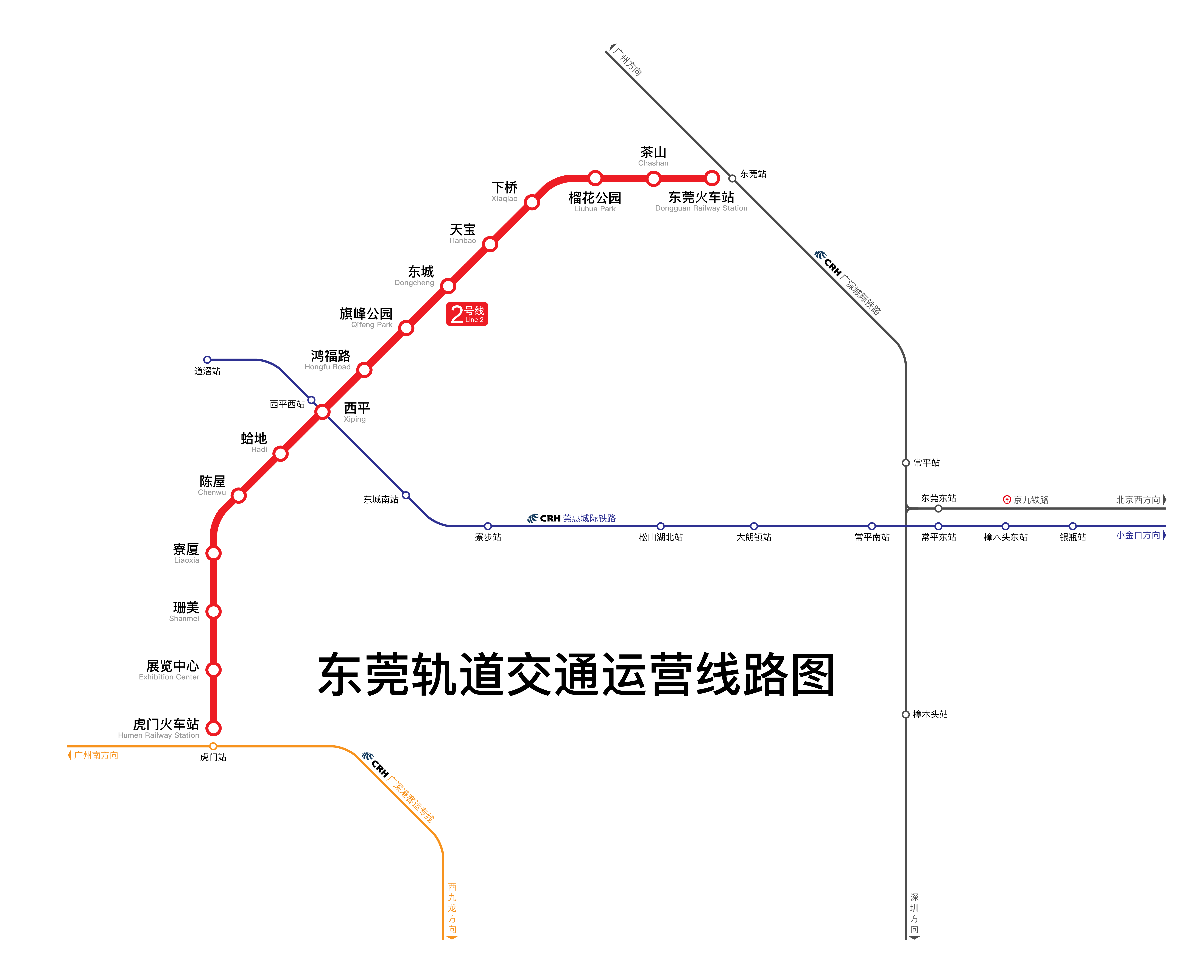 东莞轨道交通运营线路图，截止2017年底，包括东莞地铁2号线及广深港高铁、广深城际铁路、莞惠城际铁路东莞境内部分